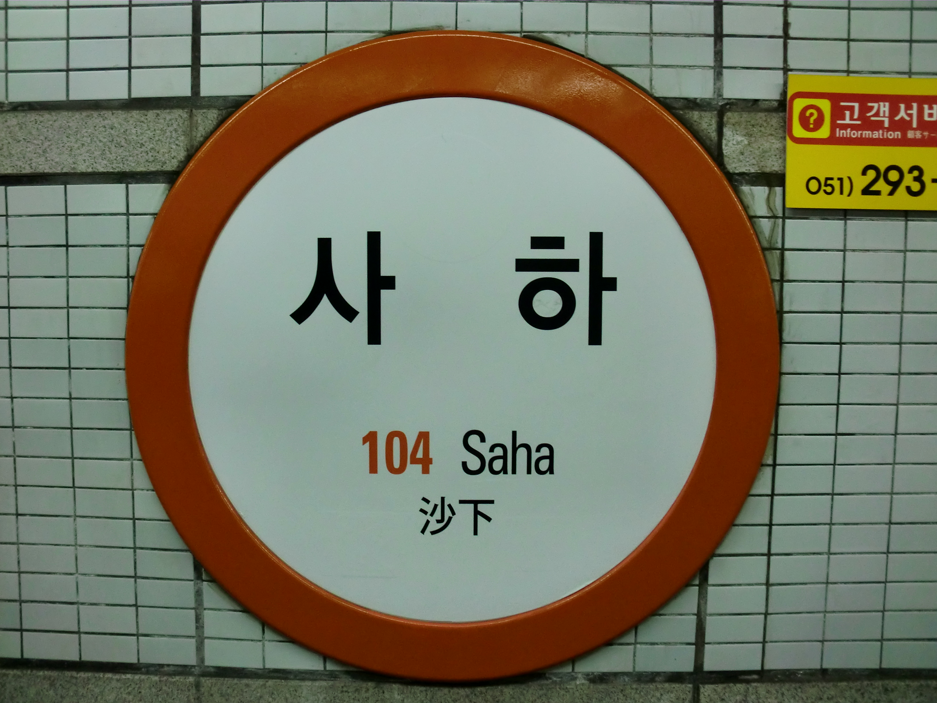 부산도시철도 1호선 사하역의 역명판